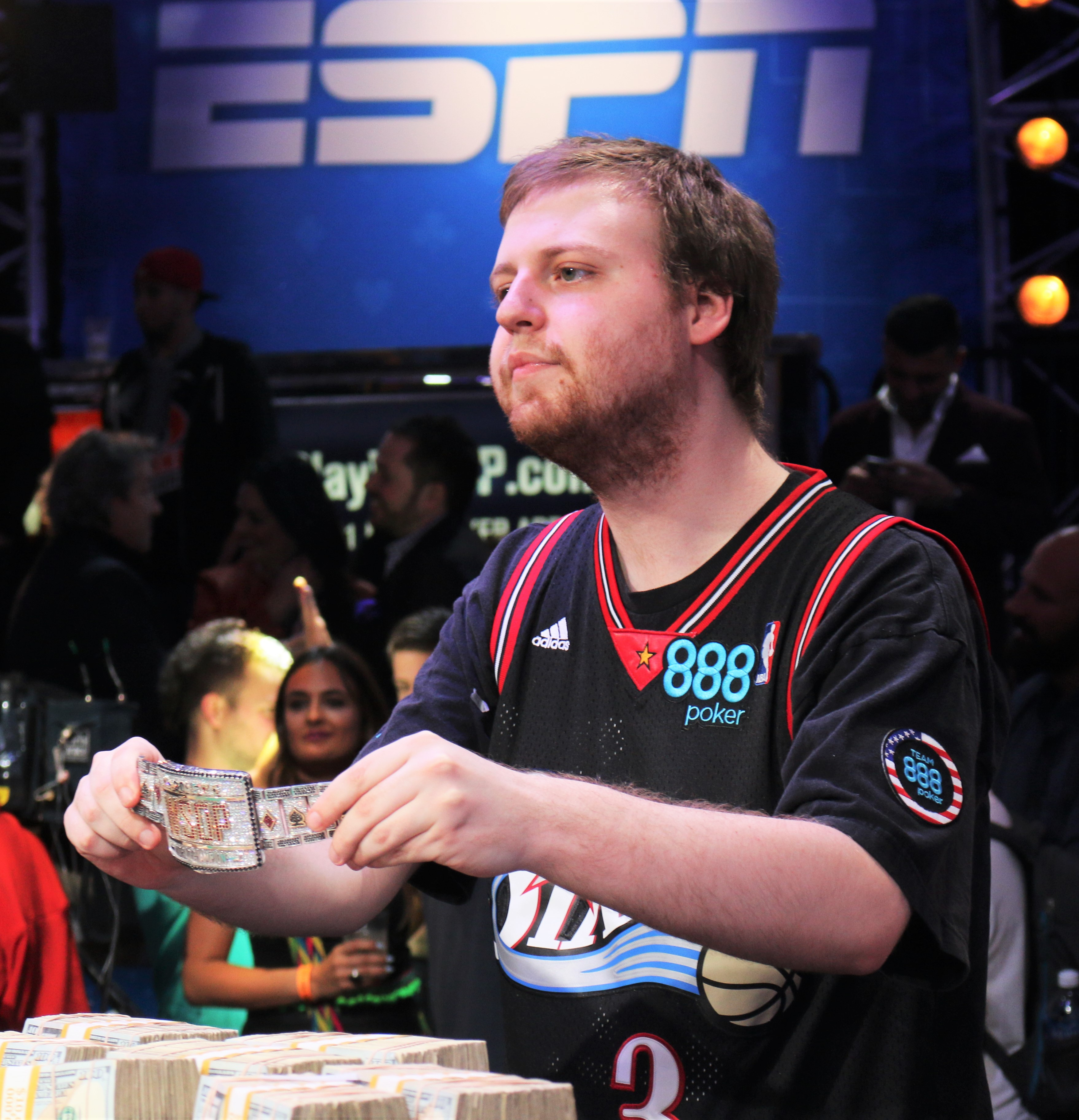 Joe McKeehen nach dem Gewinn des Main Events der World Series of Poker 2015